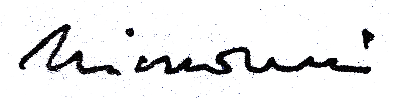 Signature de l'écrivain algérien Rachid Mimouni, scan d'après catalogue dédicacé.